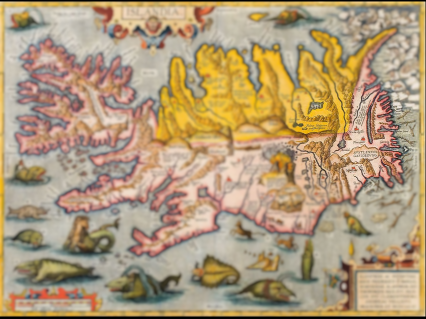 ISLANDIA MAPA tegnet af Abraham Ortelius, ca 1590. Med fokus på stednavne fra Ravnkel Frøjsgodes Saga